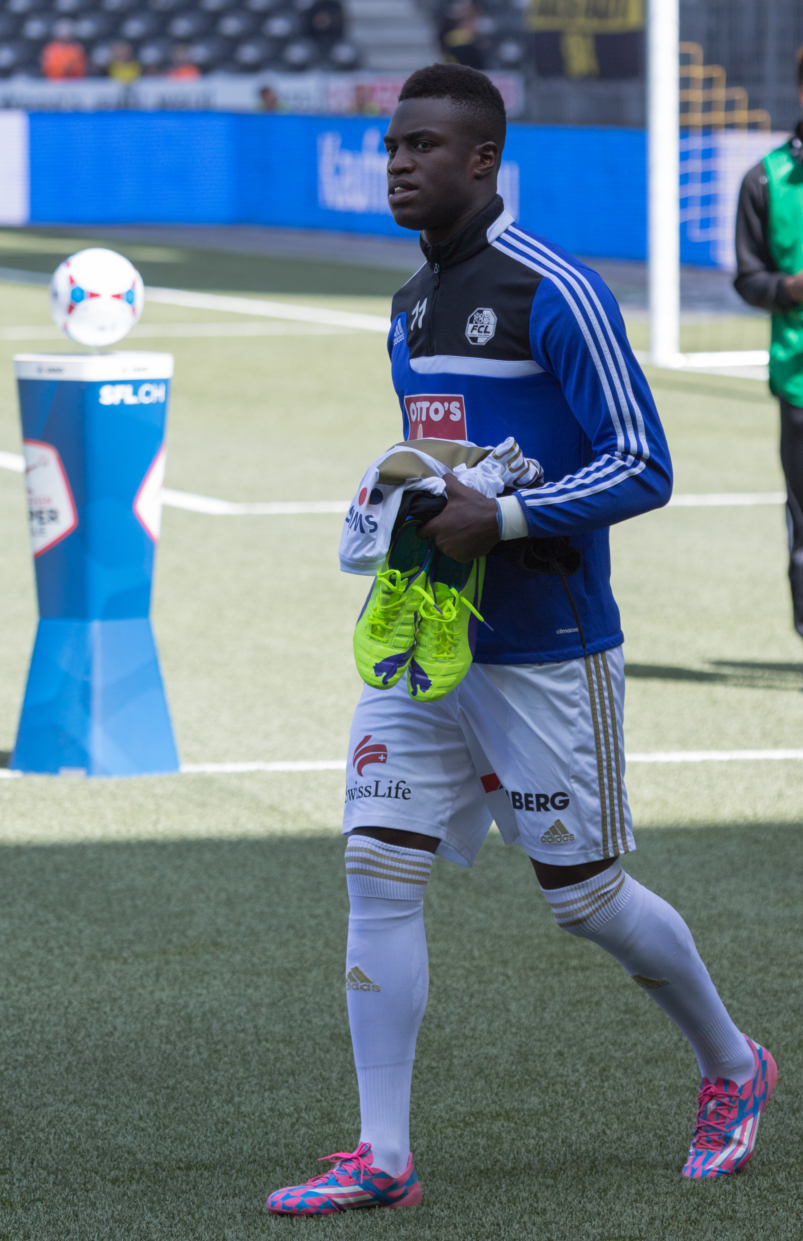 Ridge Mobulu beim Spiel des BSC Young Boys gegen den FC Luzern